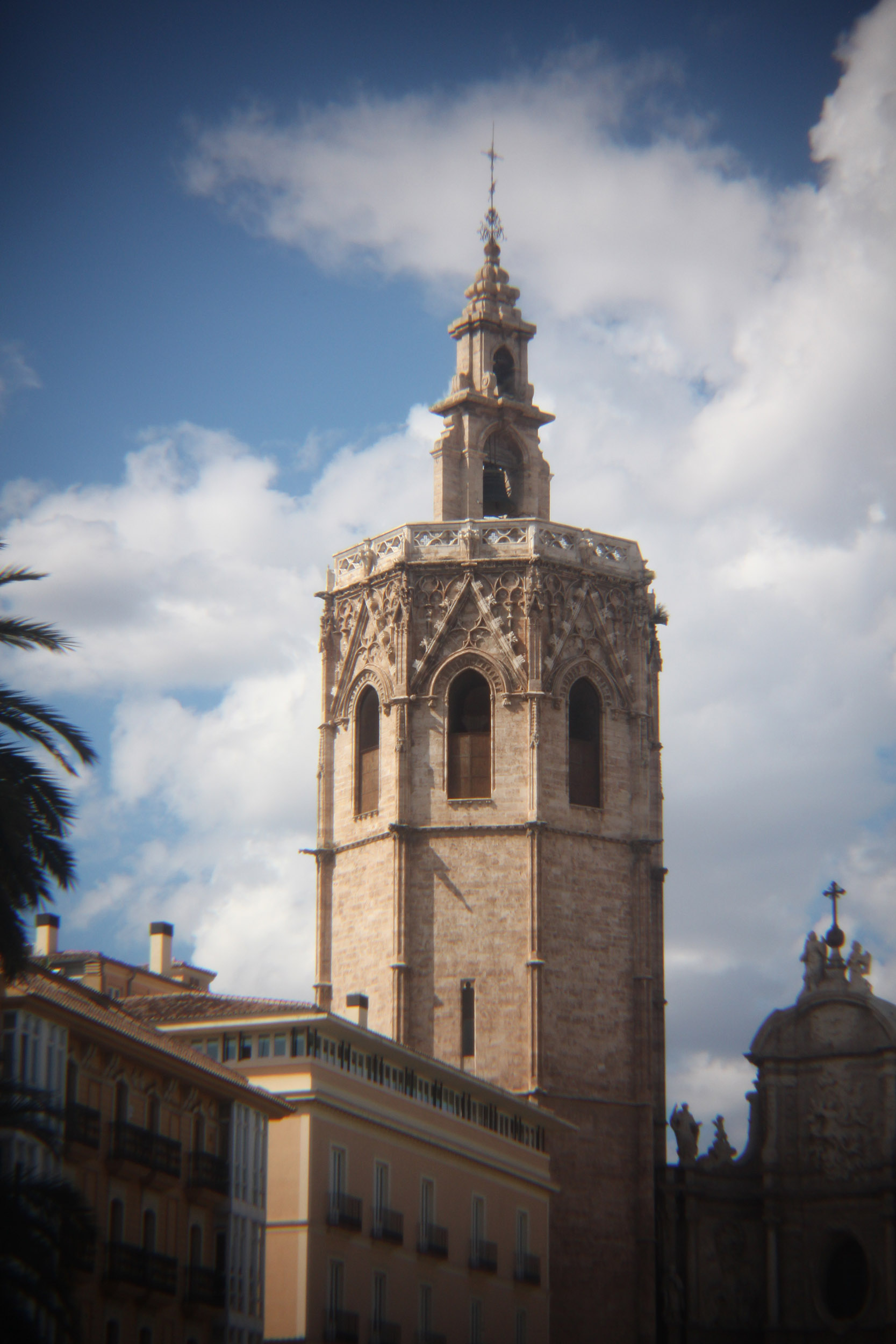 Torre del Miguelete (El Micalet)